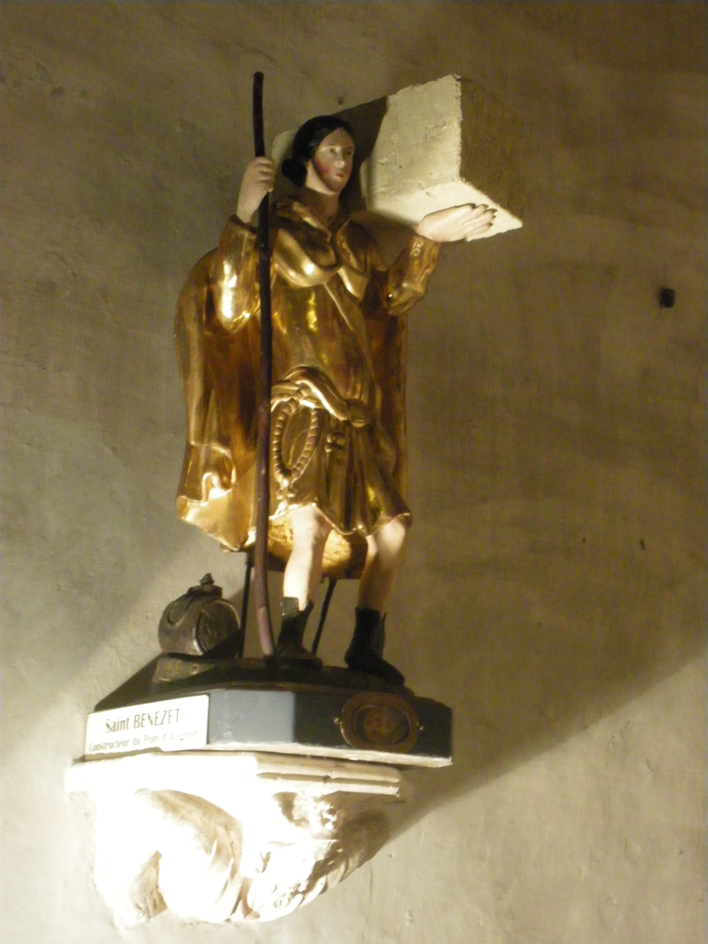 Saint Bénézet, Cathédrale Notre Dame des Doms d'Avignon, Vaucluse